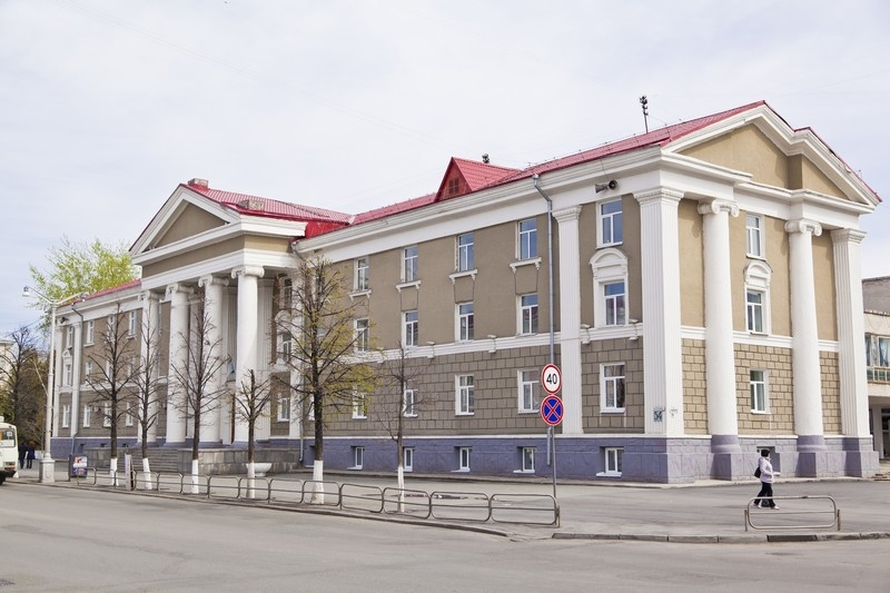 Kurgan.Pro